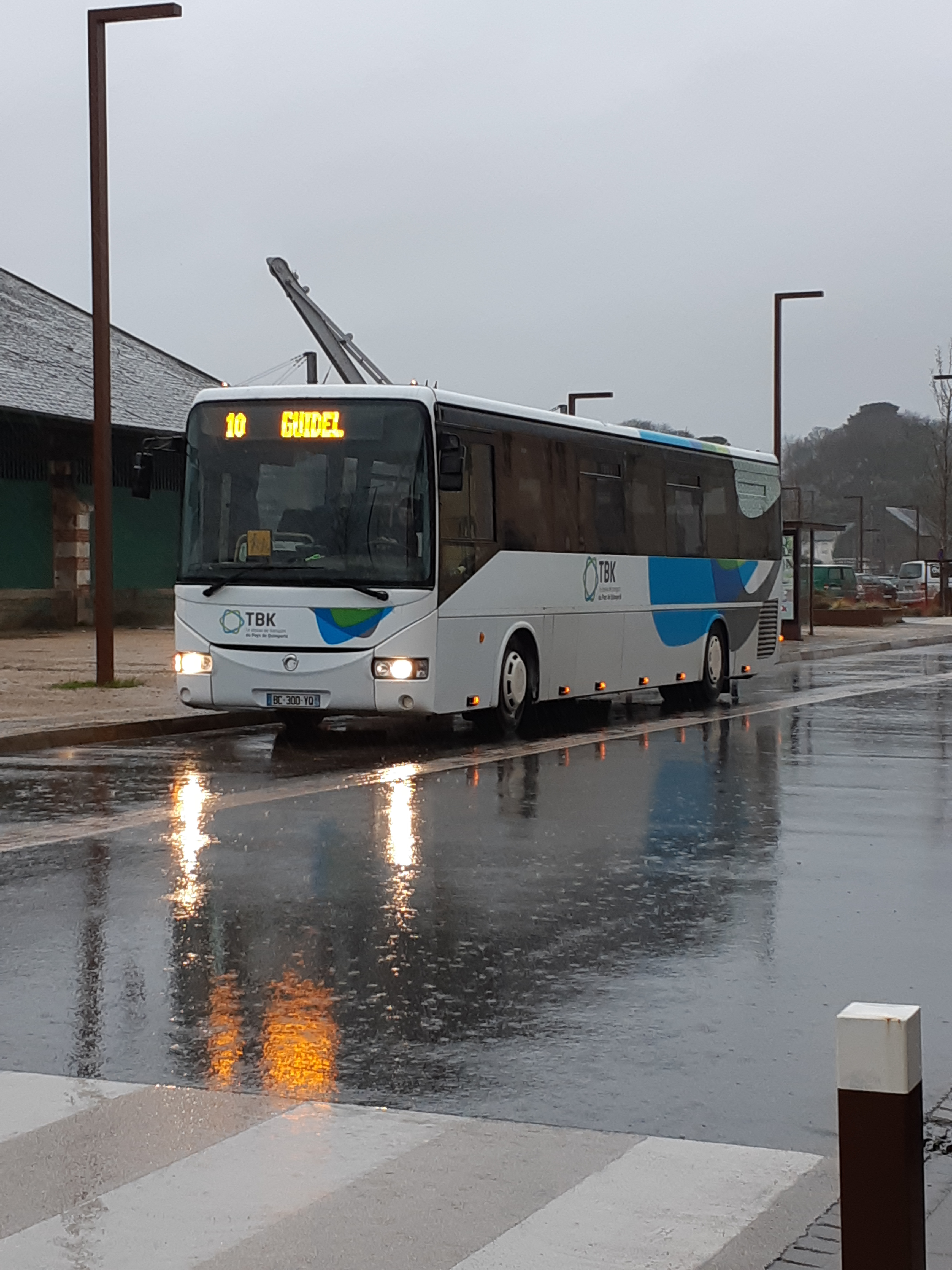 Bus Irisbus Récréo 2 officiant sur la ligne 10, vers Guidel, du réseau TBK, le 16 janvier 2020.